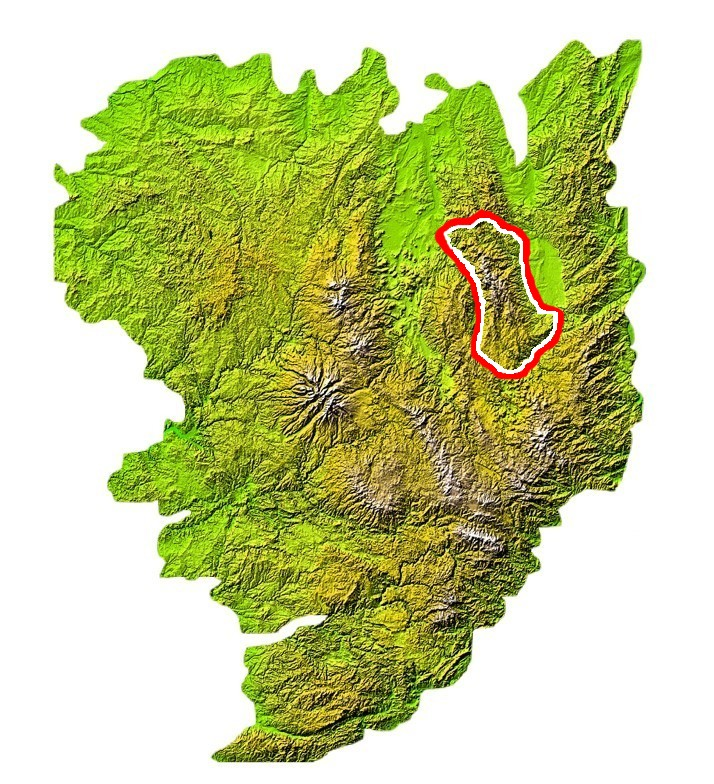 Situation des Monts du Forez sur la carte du Massi central